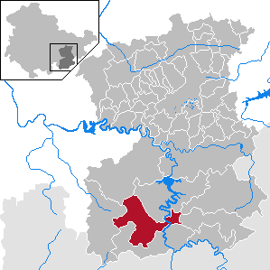 Bad Lobenstein in Thuringia - Saale-Orla-Kreis